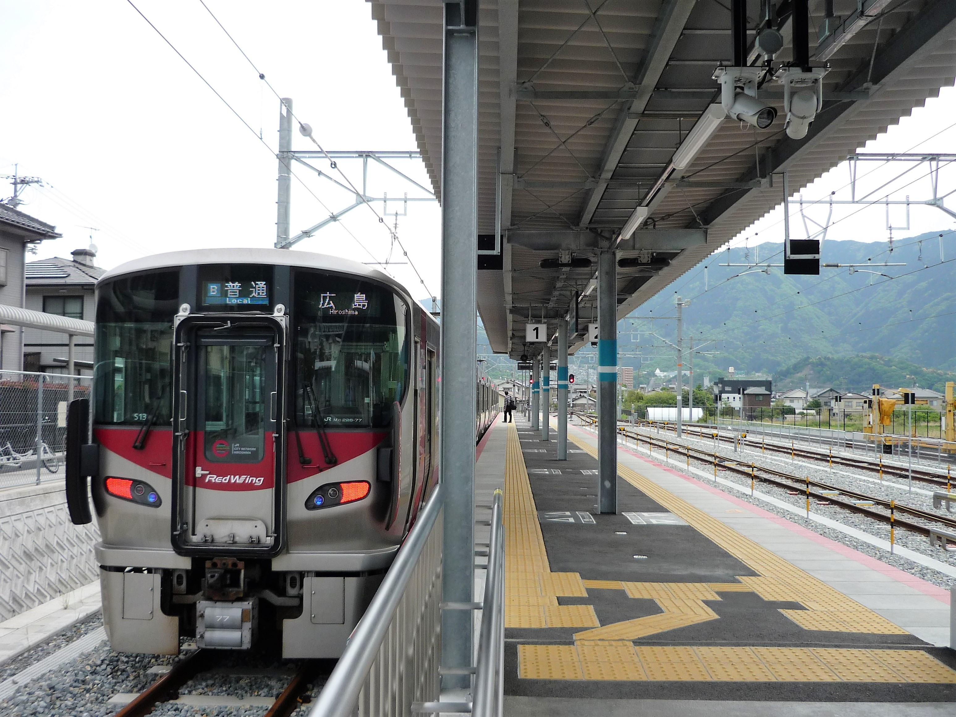 あき亀山駅に停車中の可部線普通列車